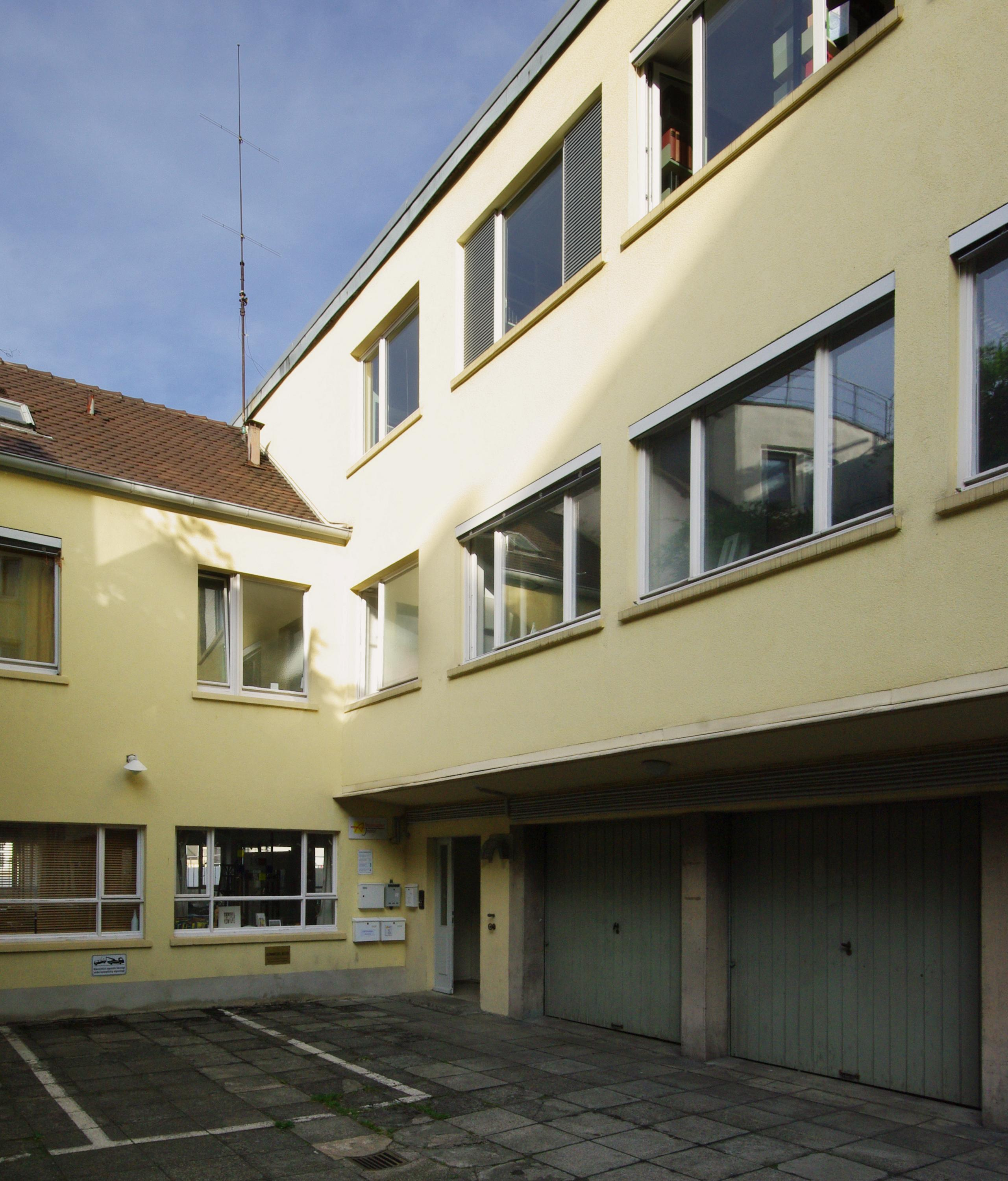 Der Eingang zum Alemannischen Institut